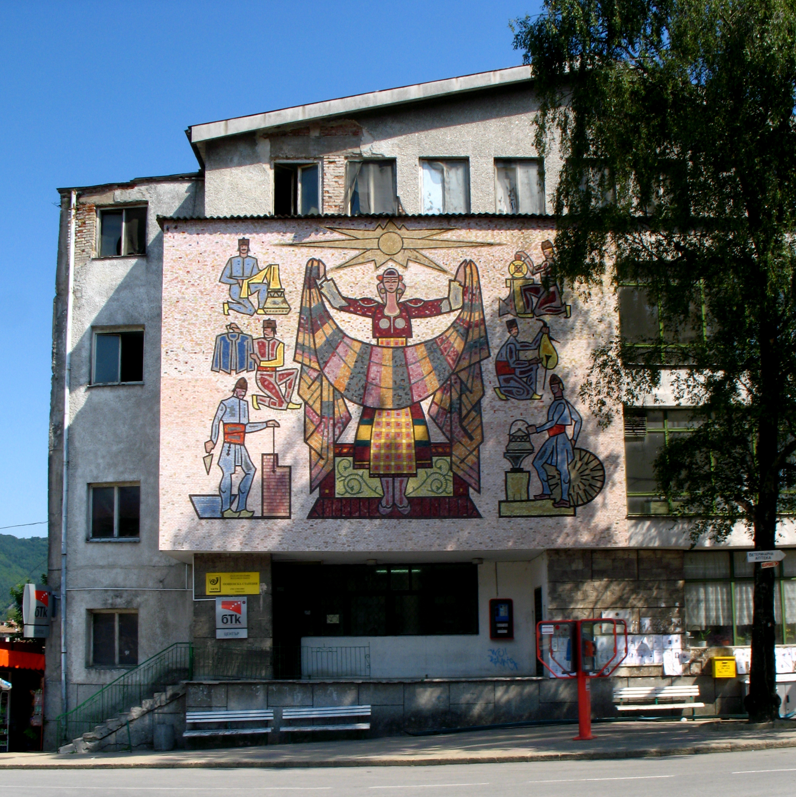 „Изкуство в Устово“ — „Кв. Устово в Смолян“